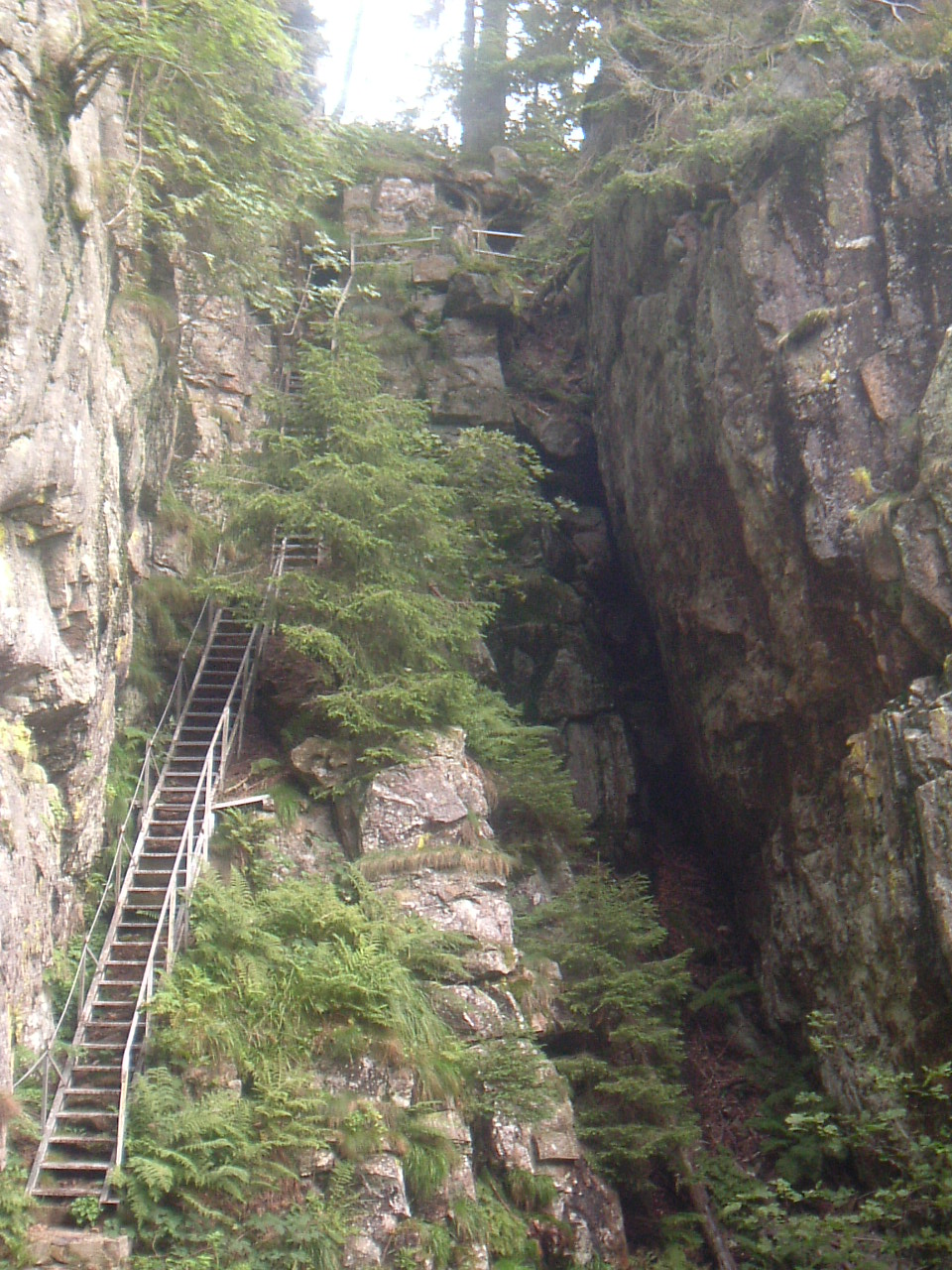 Hirschsteine, Vogesen